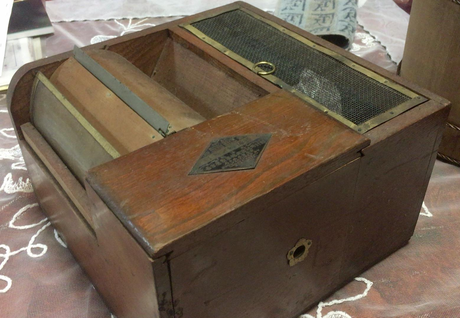 大正～昭和期にかけて製造されたと思われる、村瀬式蠅捕器。三好日出一氏所有品。